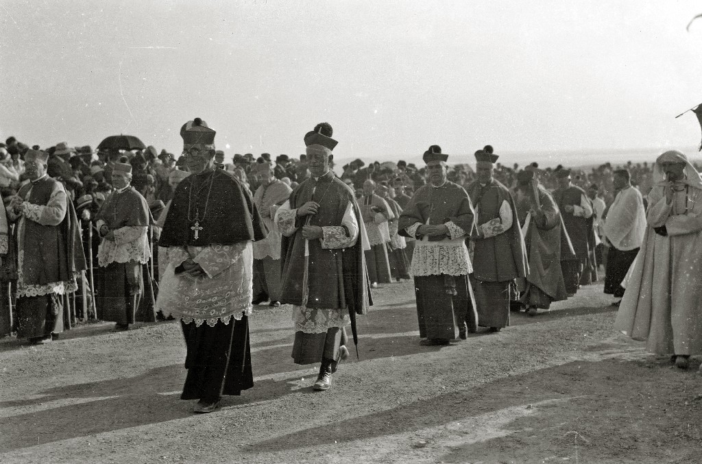 Título original: Peregrinación española al XXX Congreso Eucarístico Internacional en Cartago (12/26) Localización: Guipúzcoa